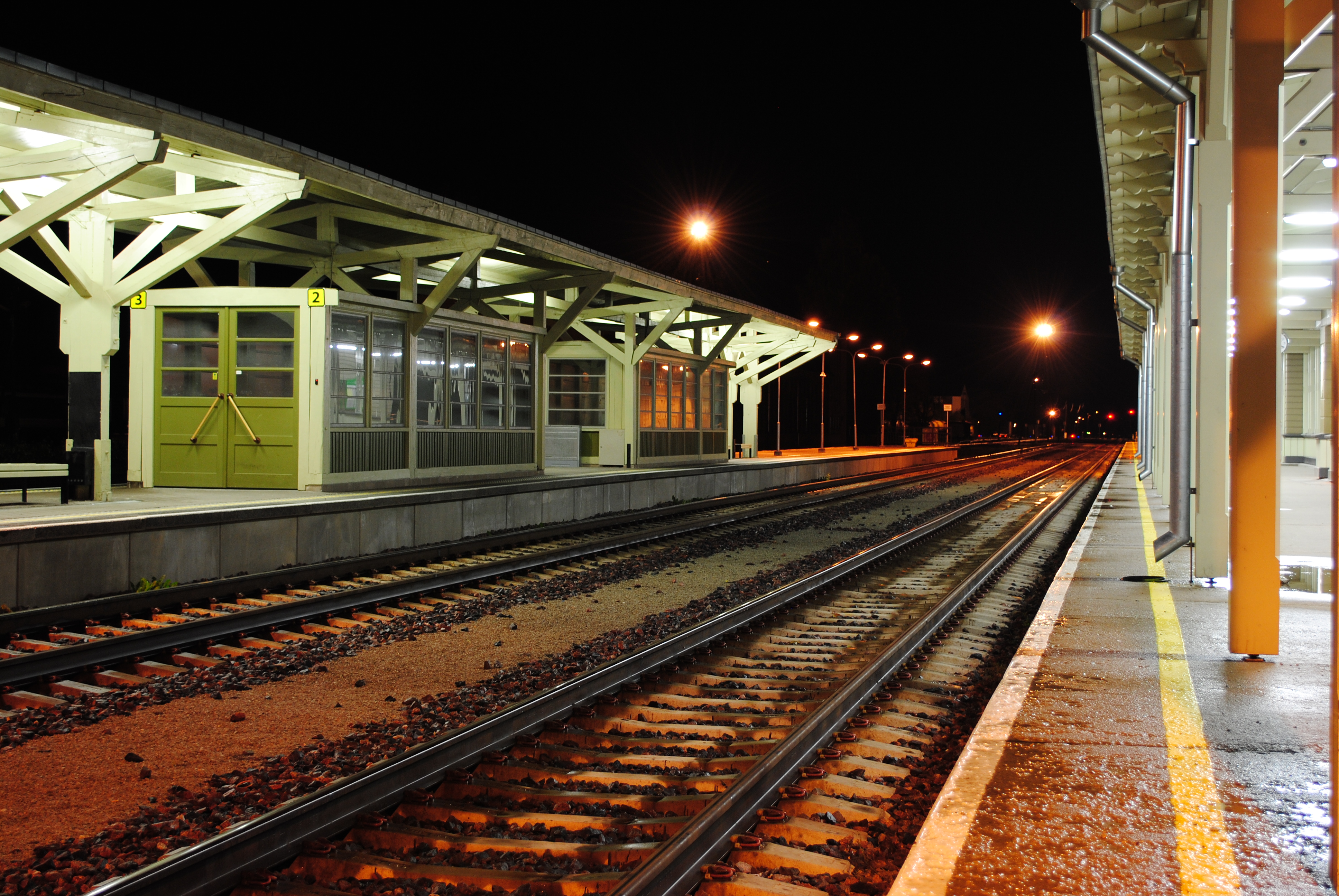 Tartu pearaudteejaam Vaksali tänaval